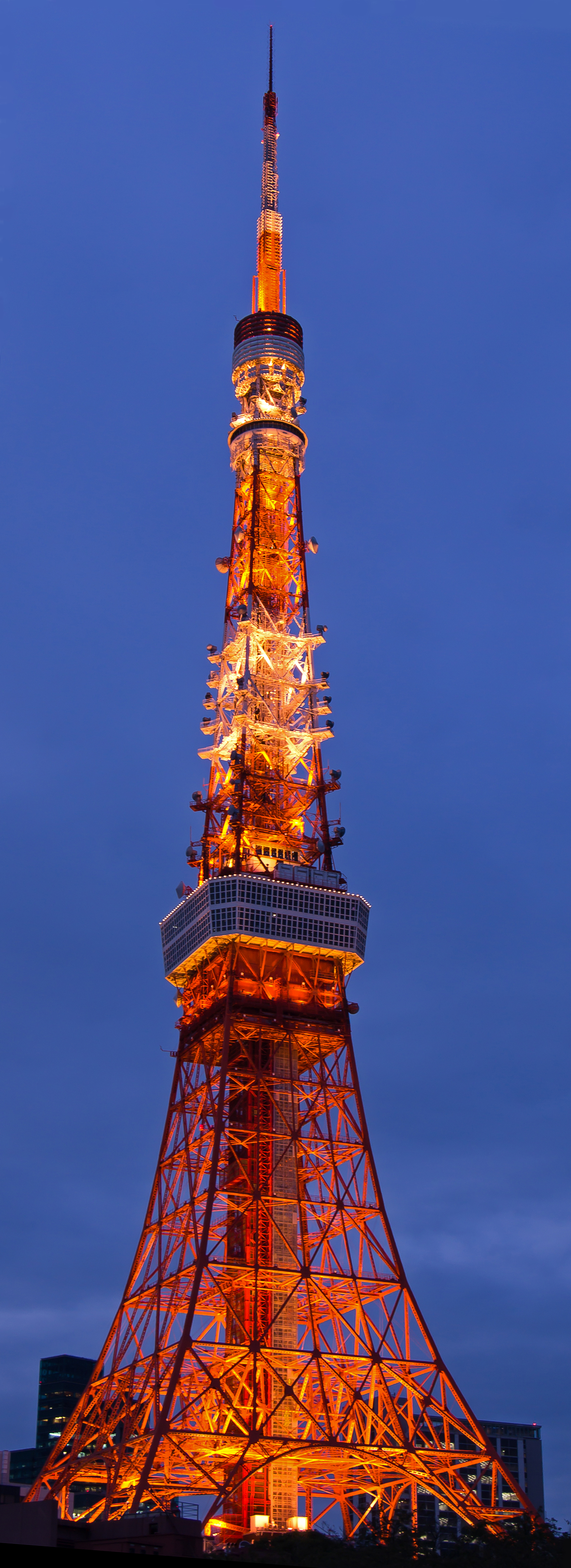 東京タワー冬のライトアップ。プリンスホテル敷地内より撮影。